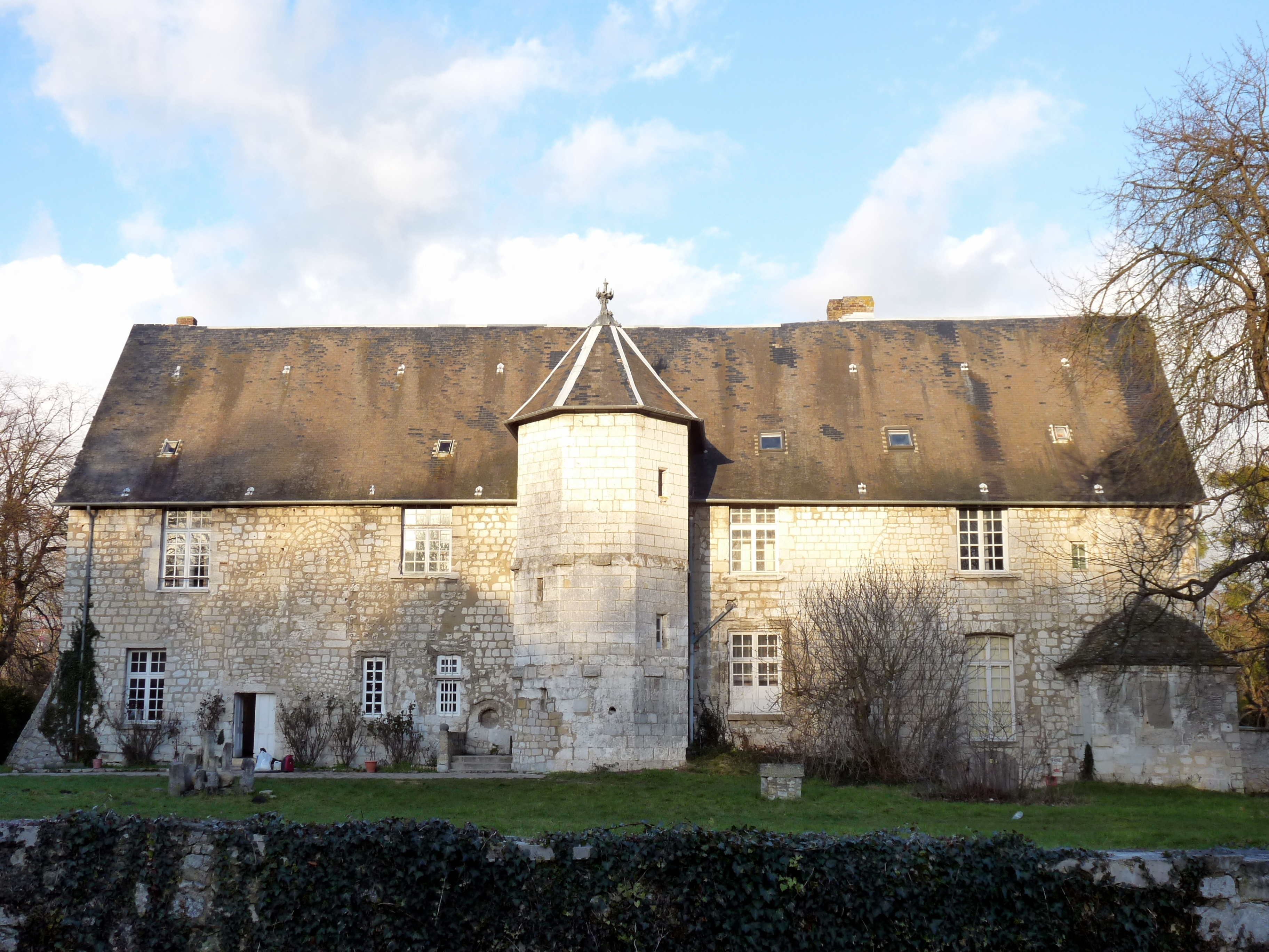 Manoir des Templiers